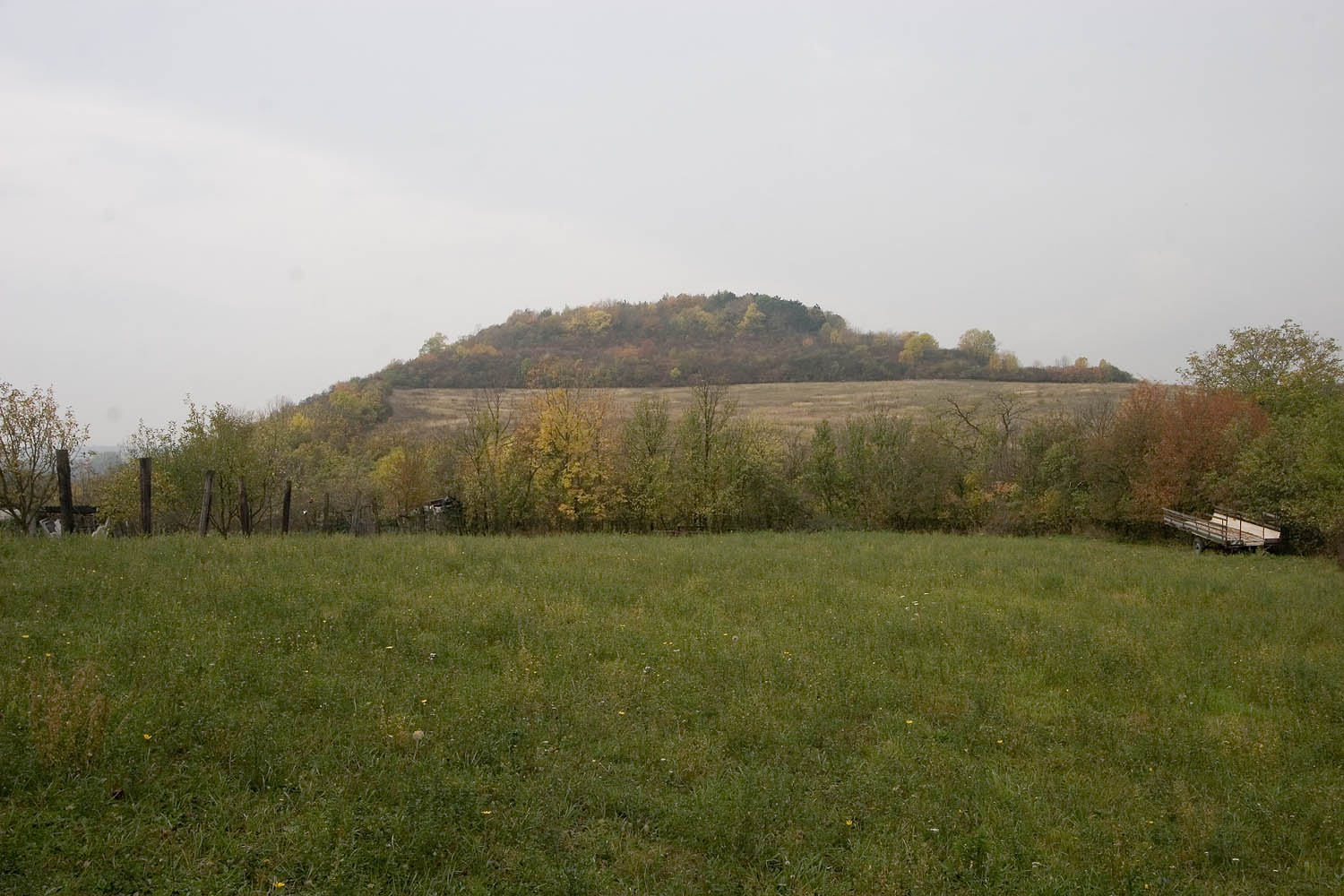 pohled na vrch Křemín od kostela Nejsvětější Trojice u Záhořan